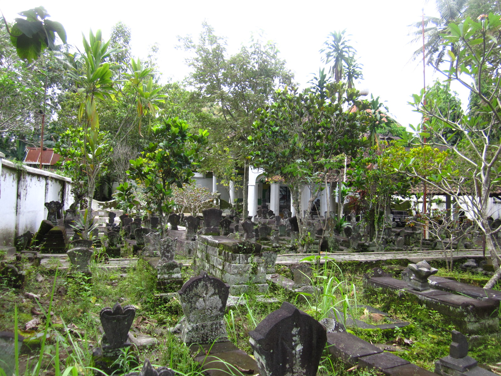 Kompleks pemakaman Ki Ageng Gribig, Jatinom, Klaten